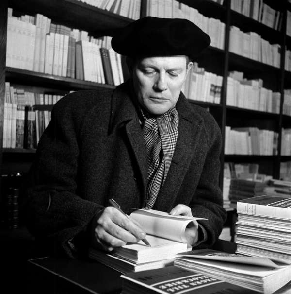 Harry Martinsson skriver dedikationer.